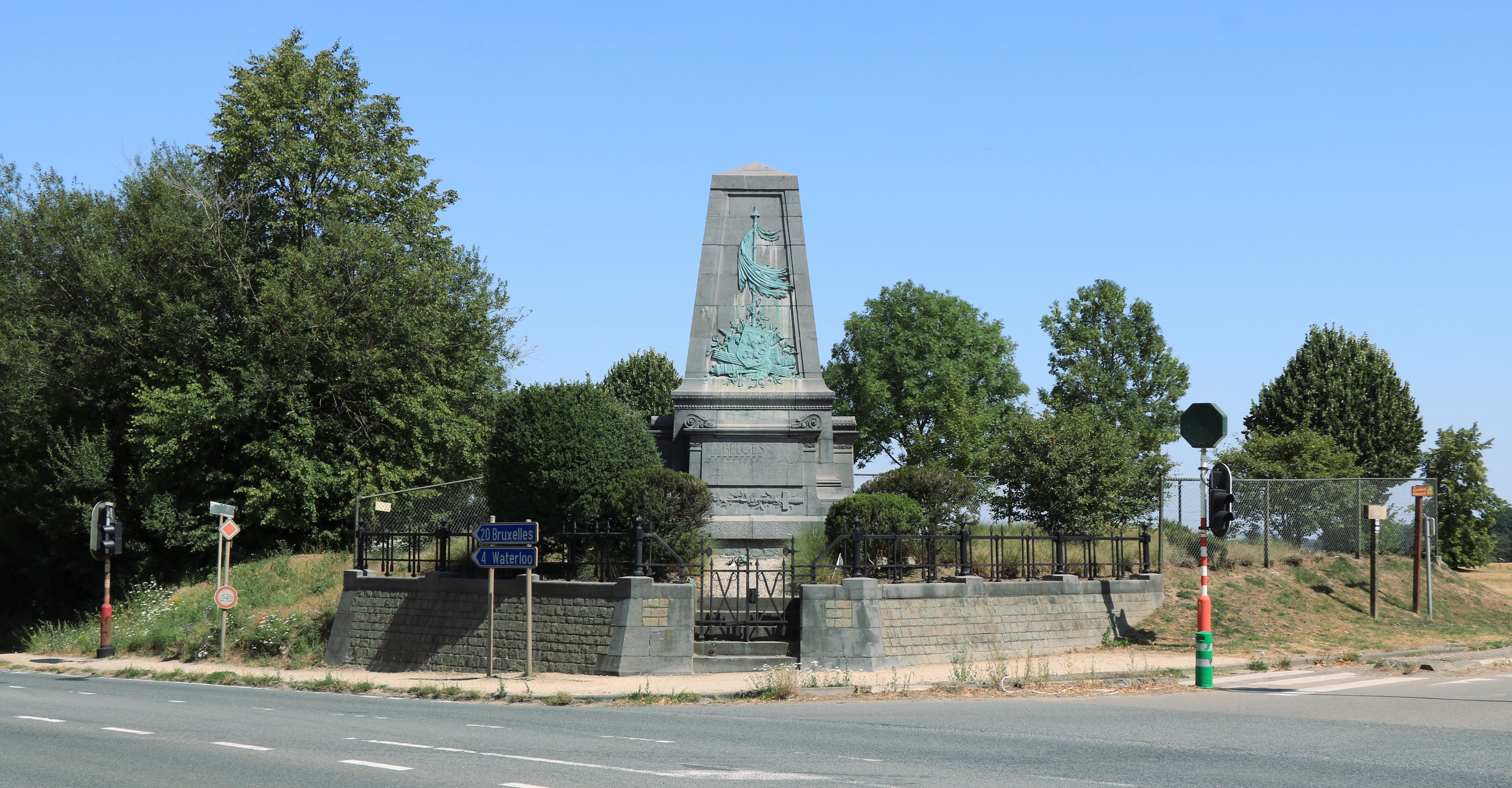 Belgique - Champ de bataille de Waterloo - Monument aux Belges (chaussée de Charleroi) This photo of immovable heritage has been taken in the Walloon Region